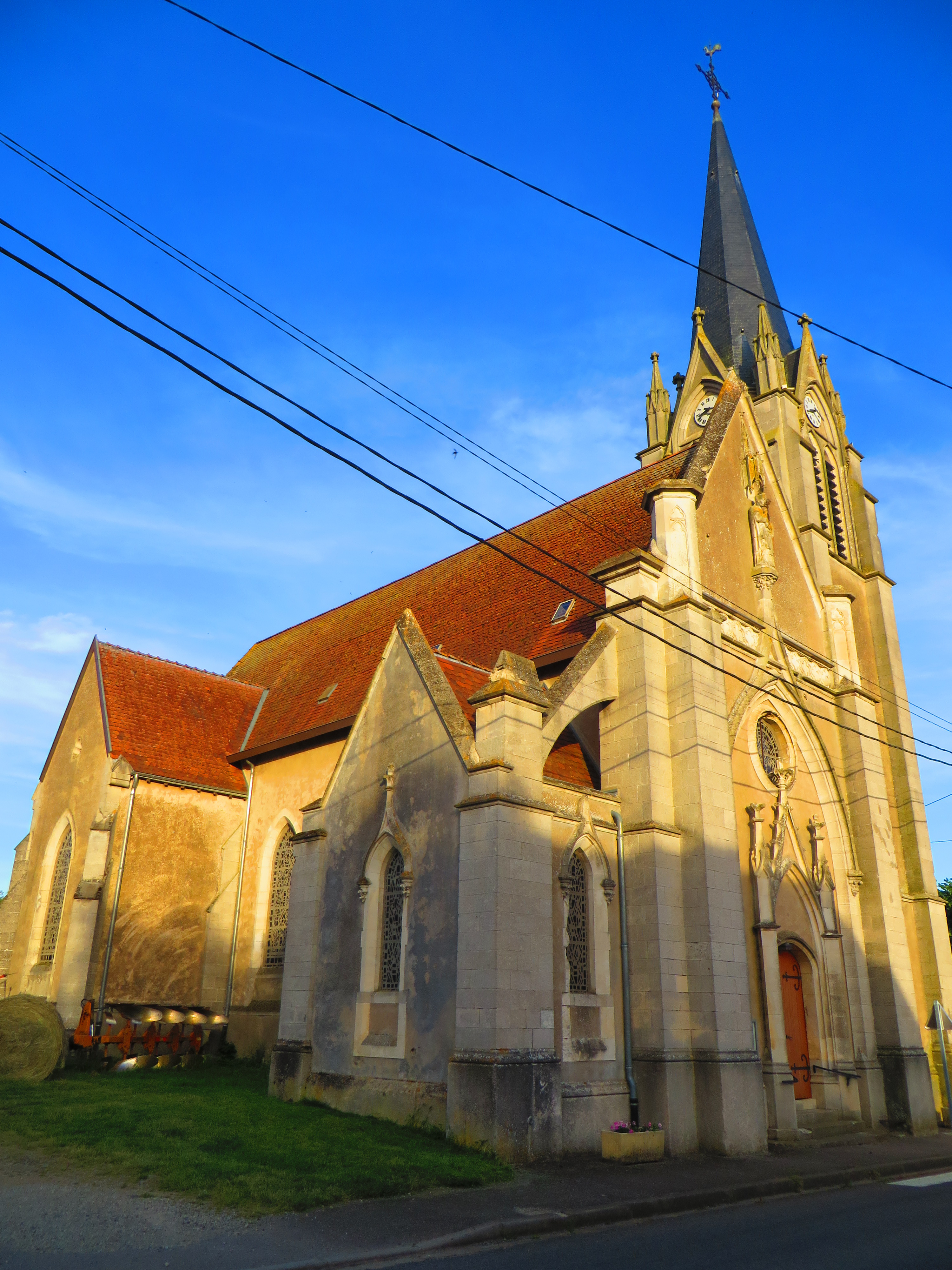 Raucourt église Saint-Martin